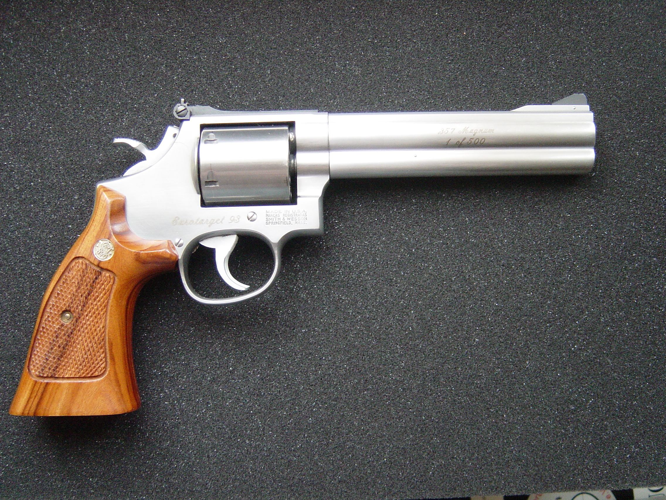 Smith & Wesson Eurotarget 93 - 1 of 500 (Seriennummer: AKA0070)